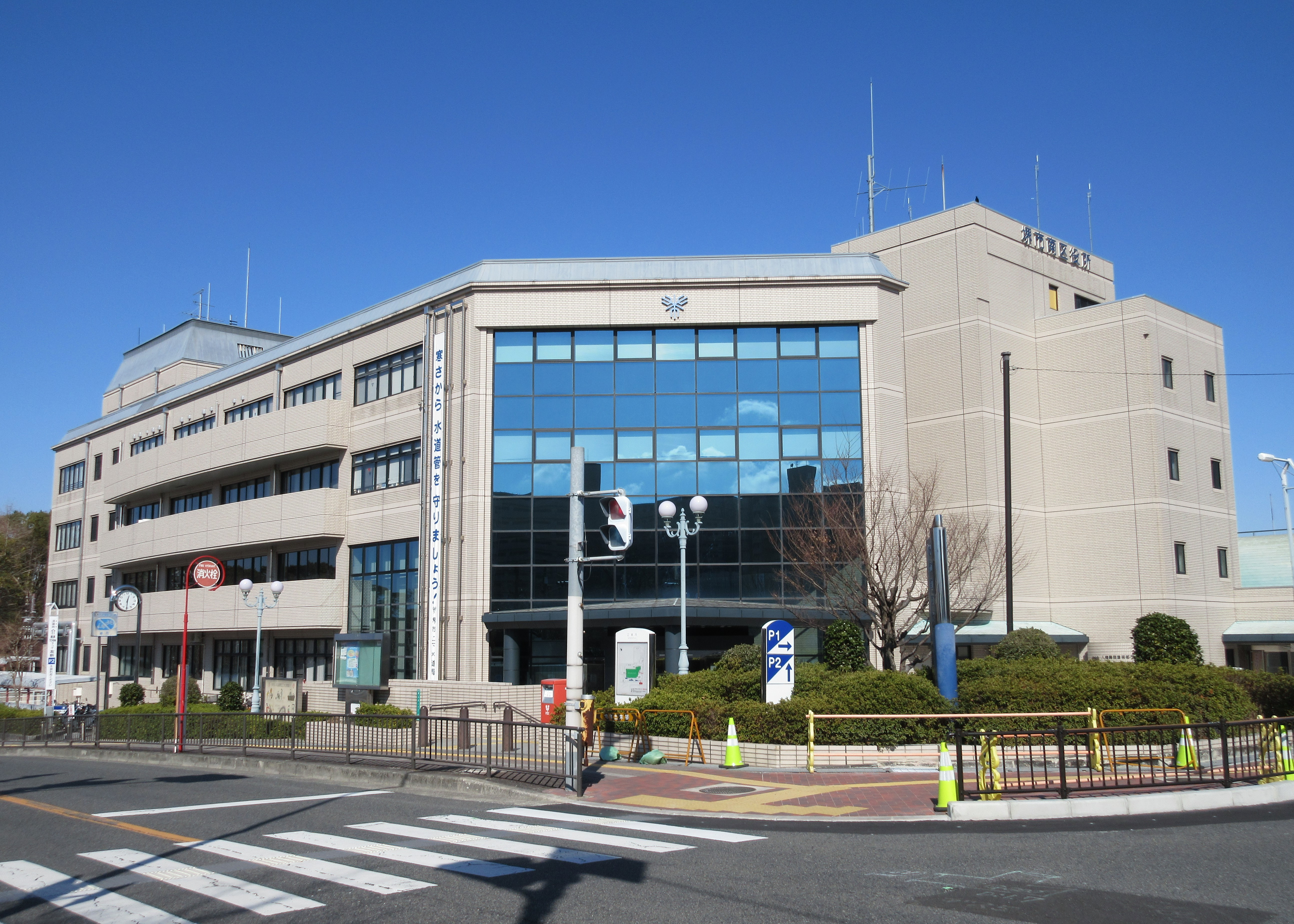 堺市南区役所